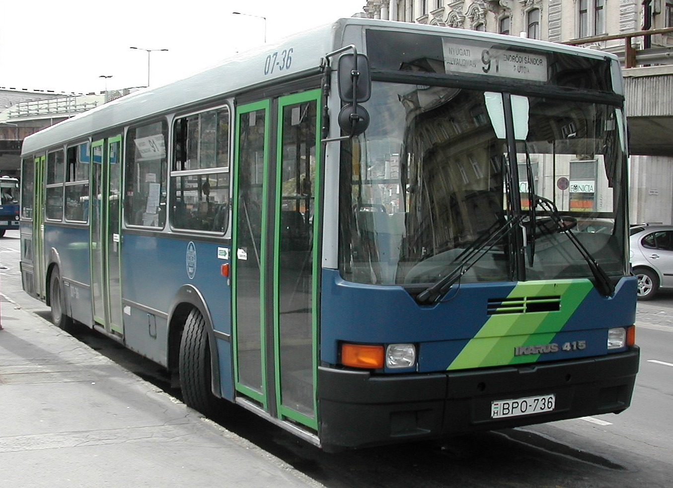 Ikarus-415 in Budapest